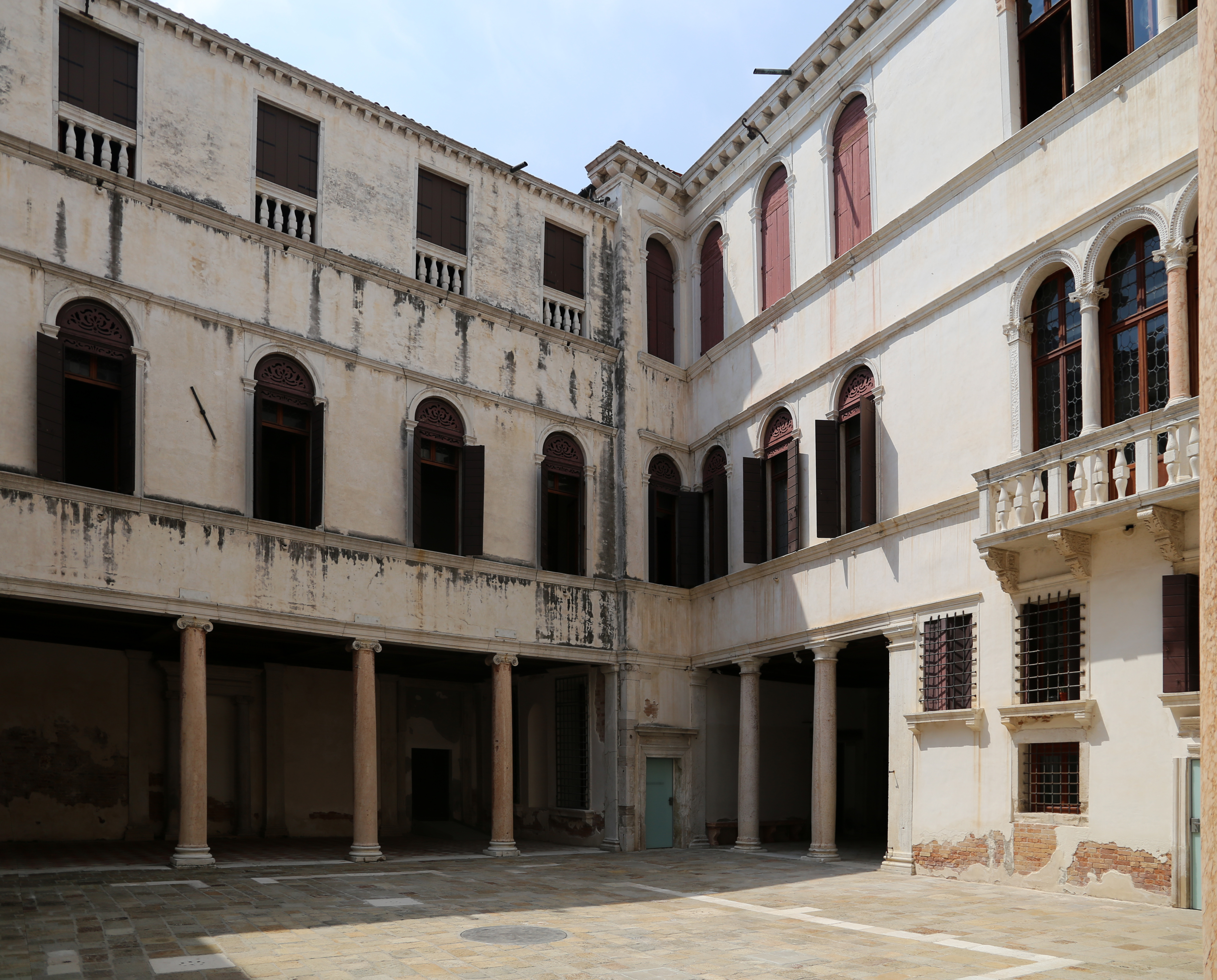 Palazzo Grimani (Castello) This is a photo of a monument which is part of cultural heritage of Italy.